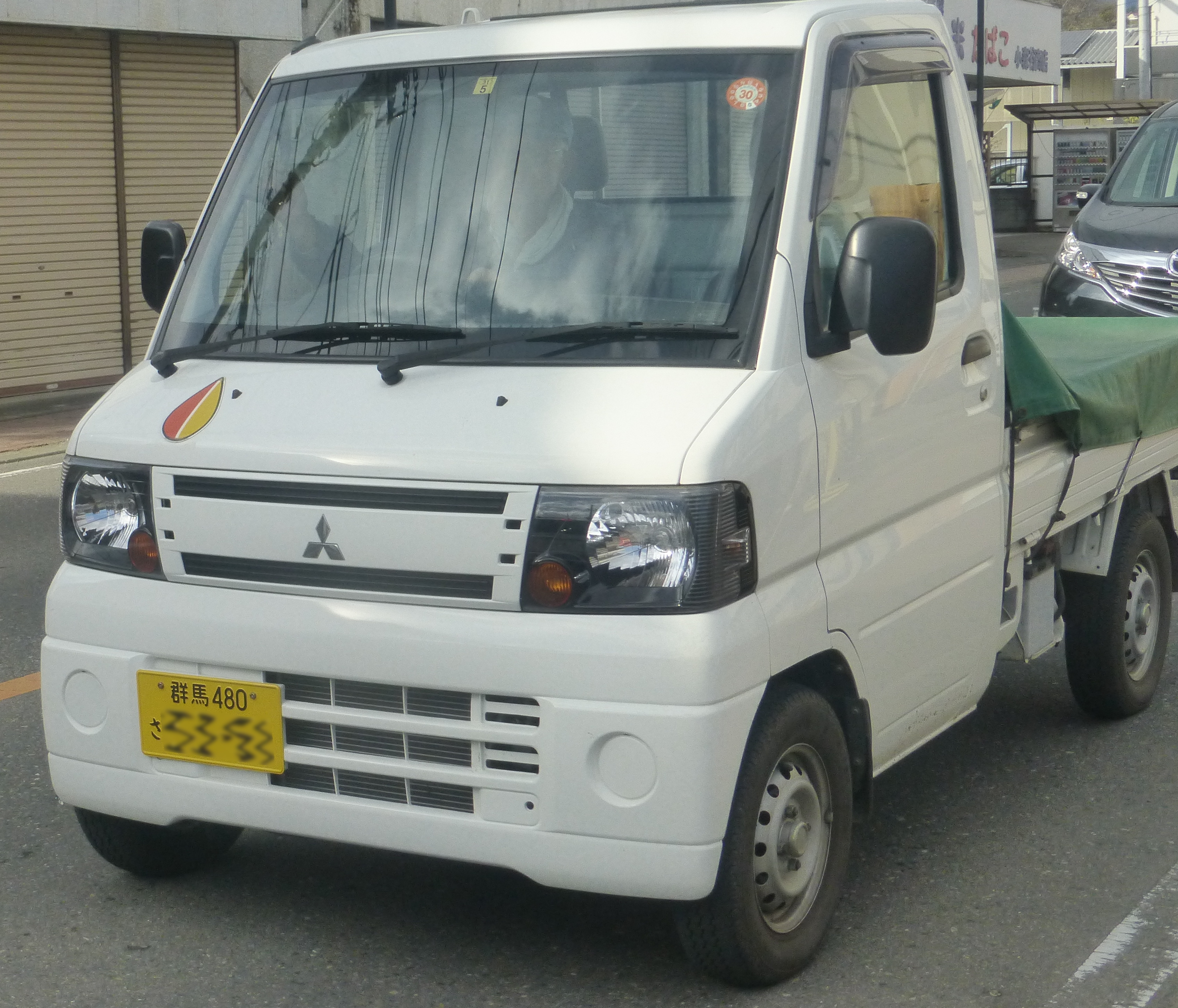 old kōreisha mark (古い高齢者マーク)